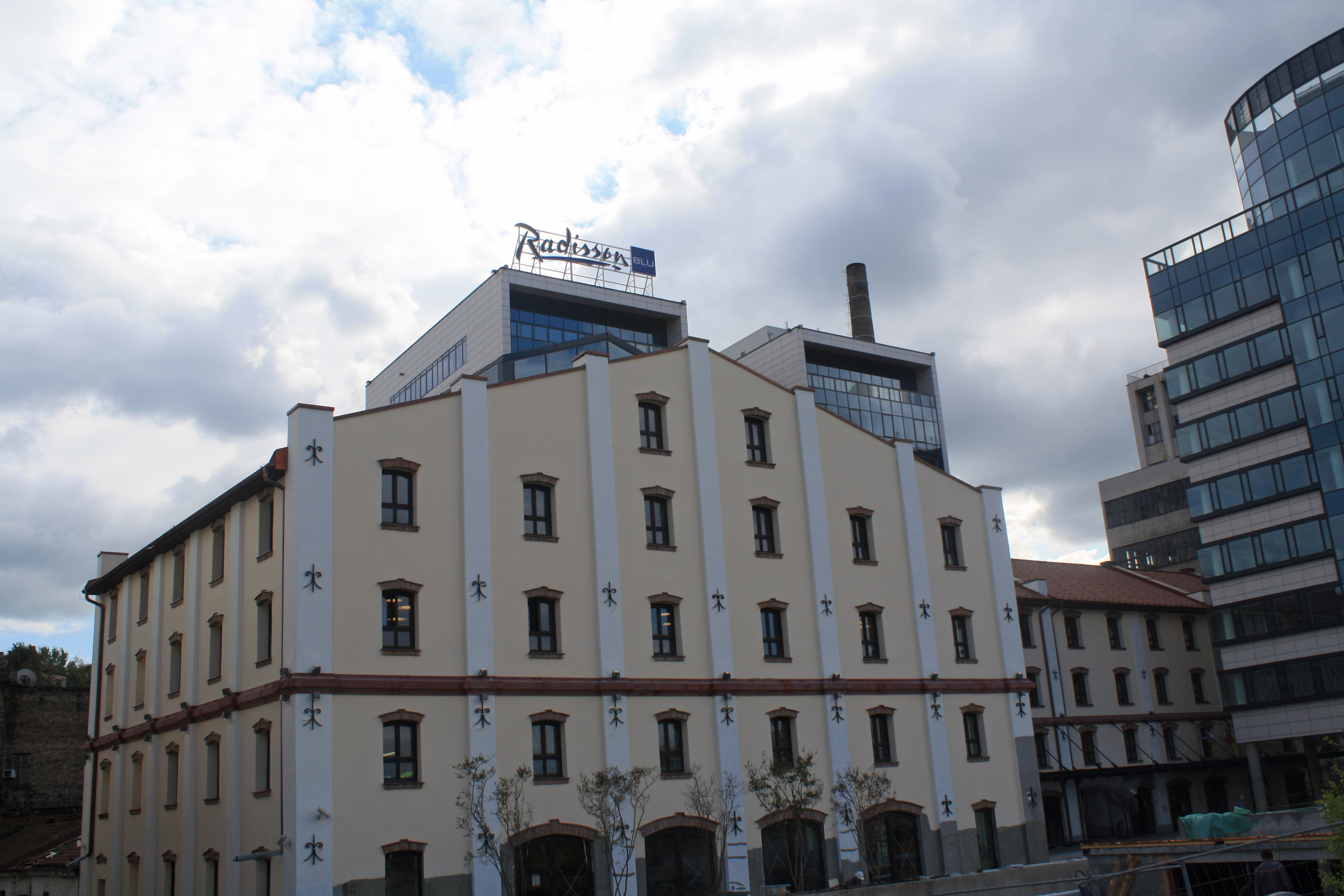 Парни млин